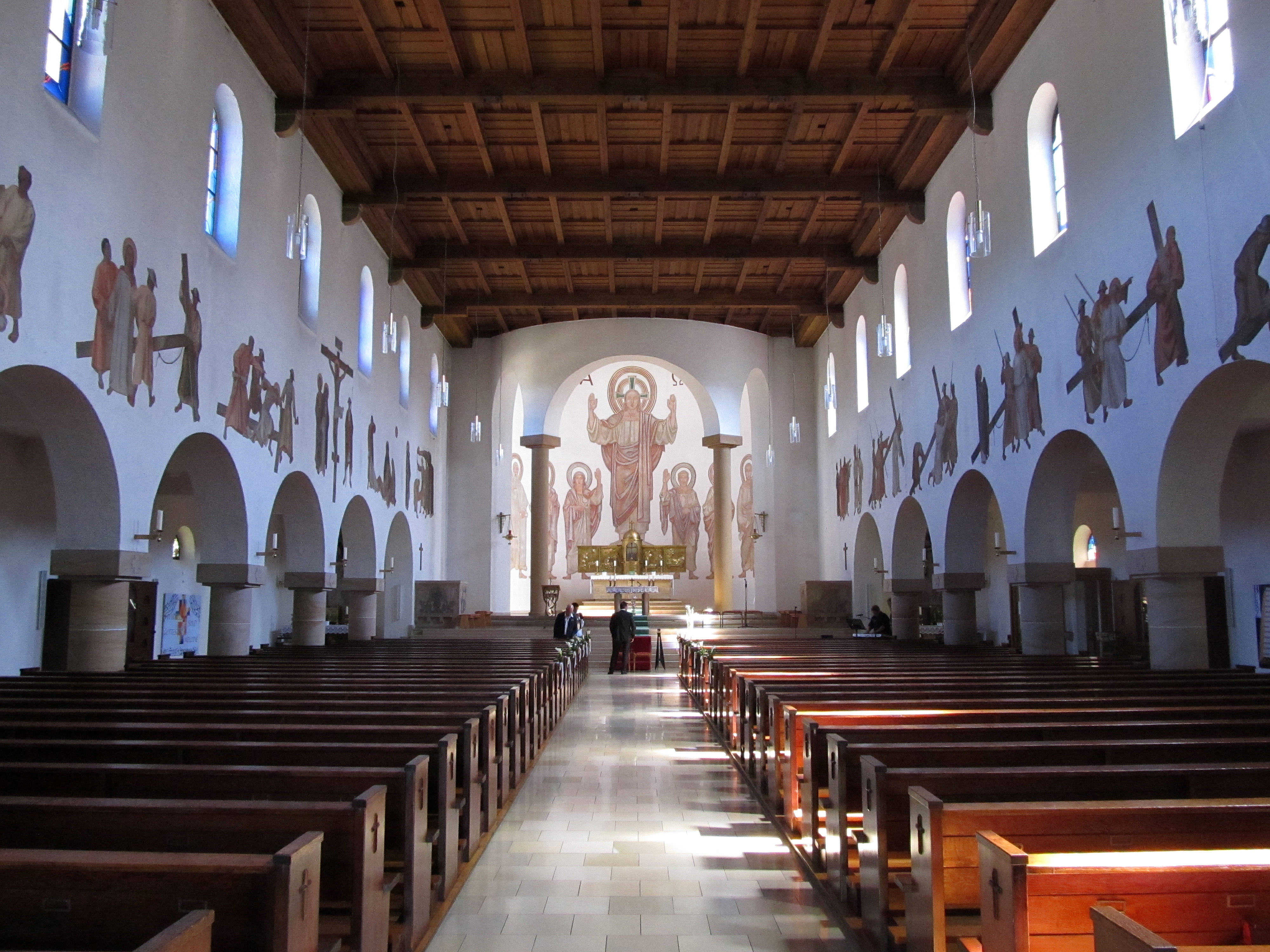 Blick ins Innere der katholischen Pfarrkirche St. Joseph in Waldfischbach-Burgalben, Kreis Südwestpfalz, Rheinland-Pfalz